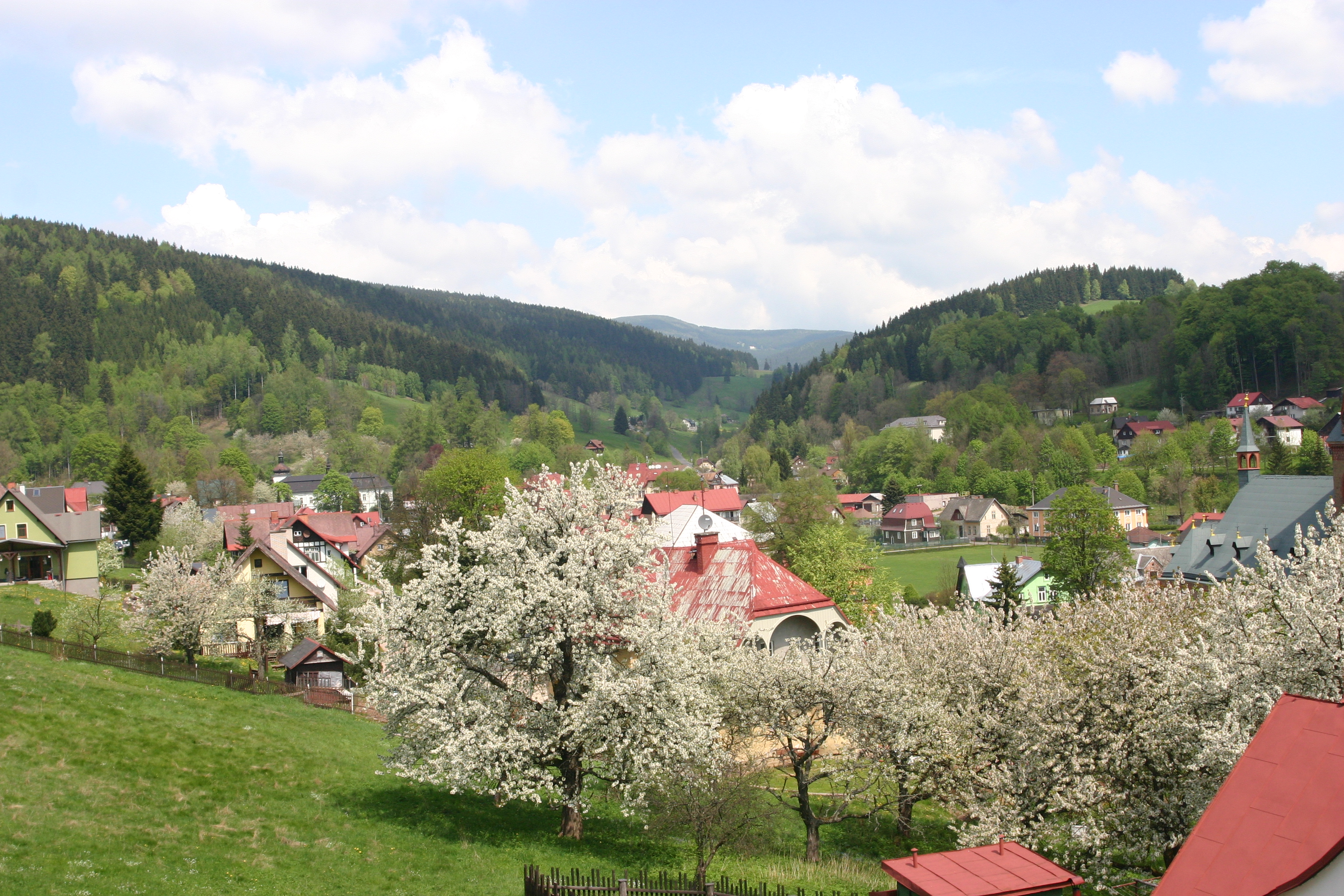 Horní Maršov, pohled od starého kostela